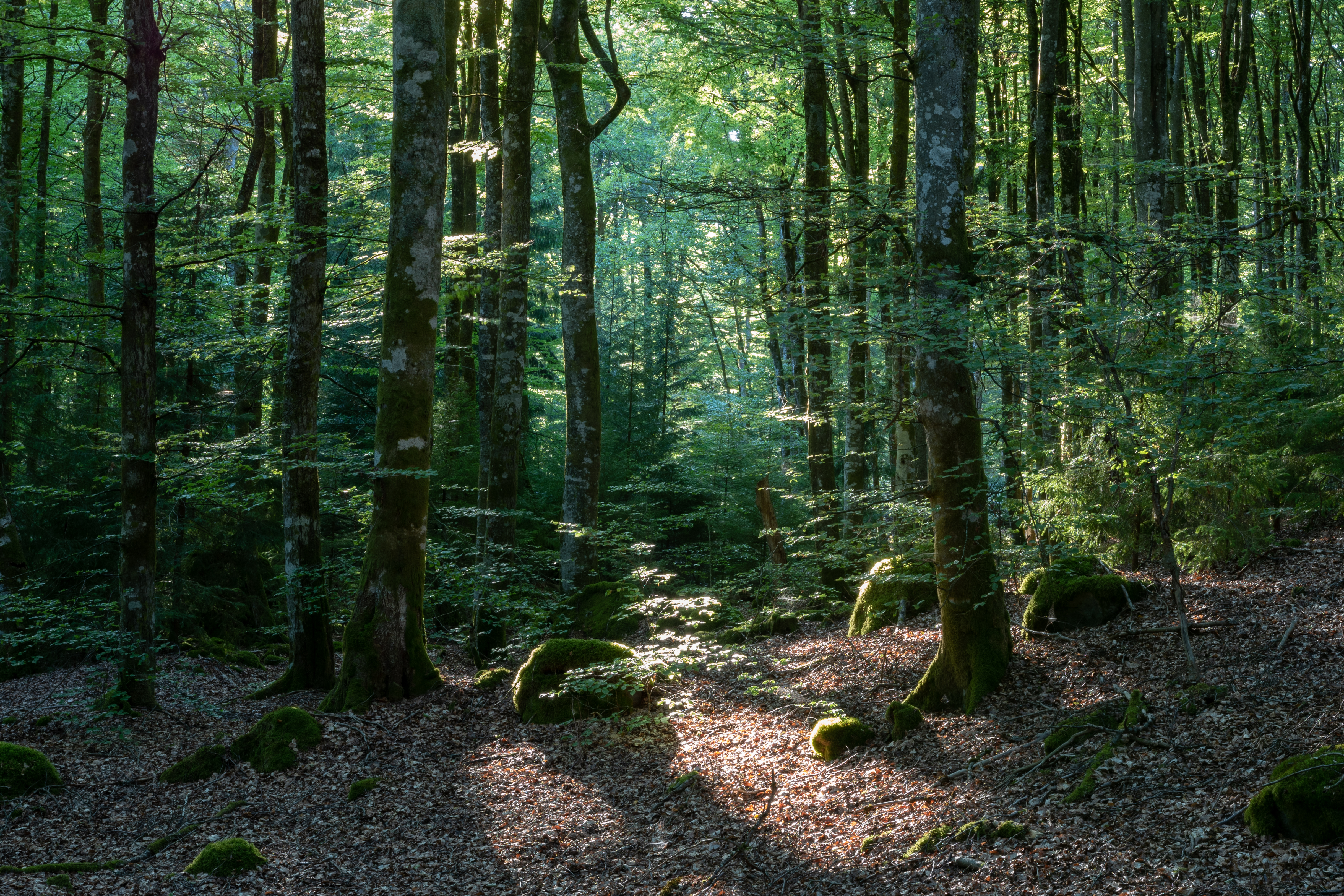 Lurs naturreservat